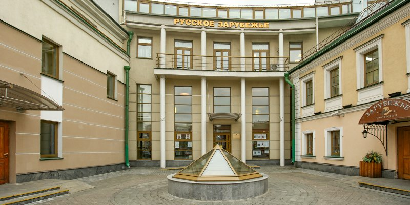 Вход в здание Дома русского зарубежья